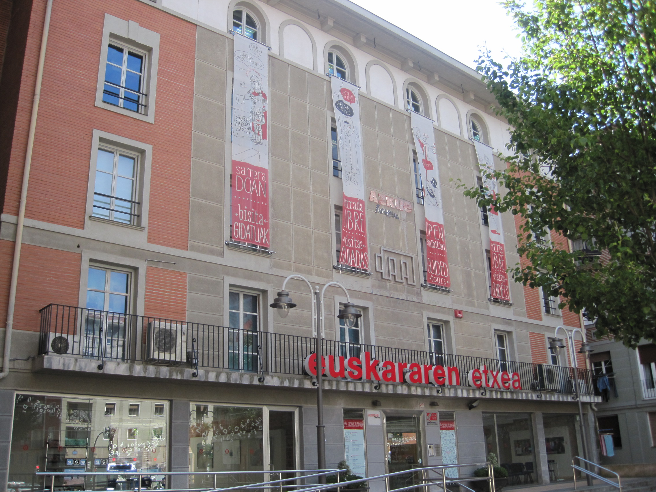 Azkue Fundazioaren etxea